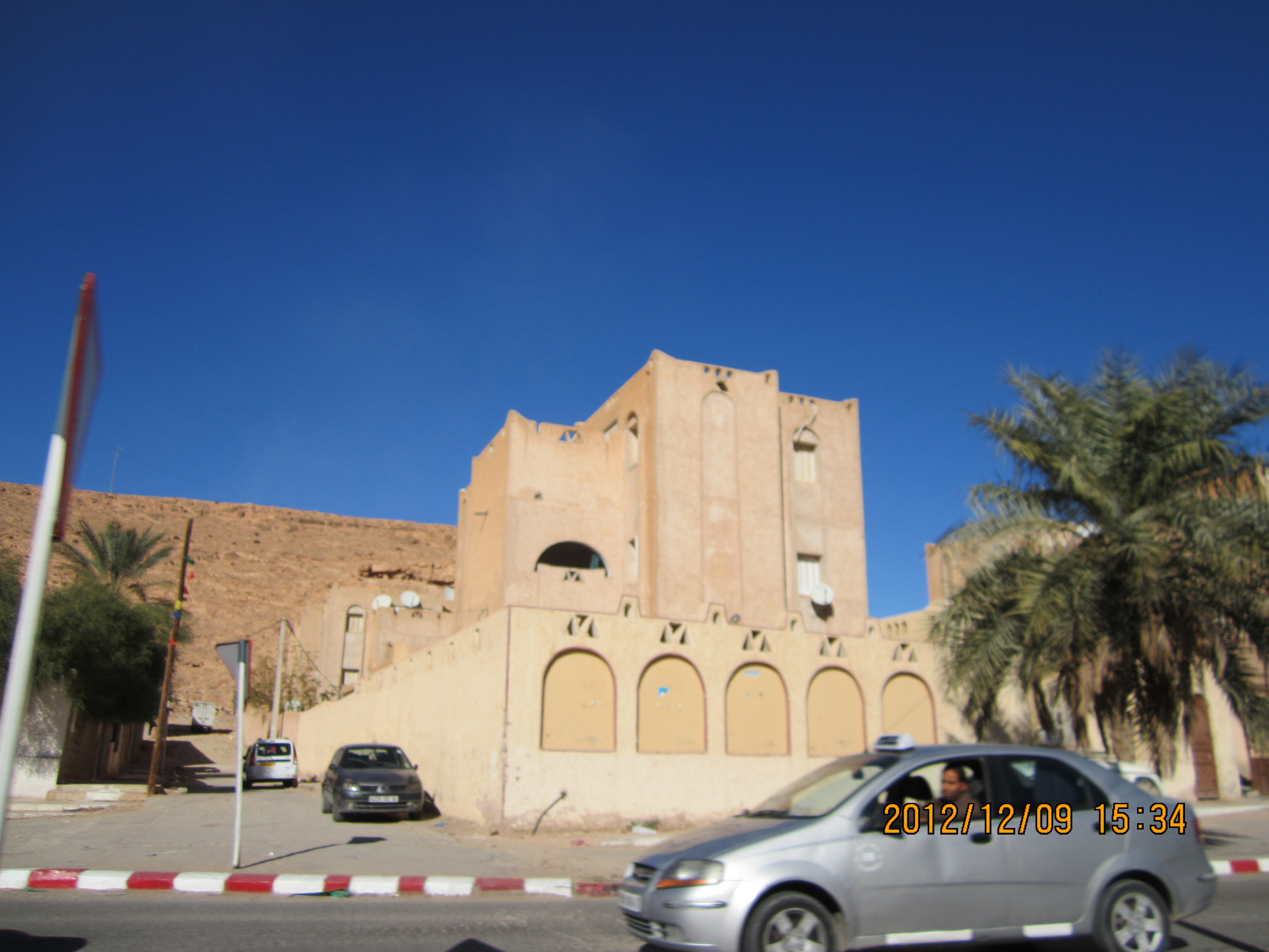 Ghardaia